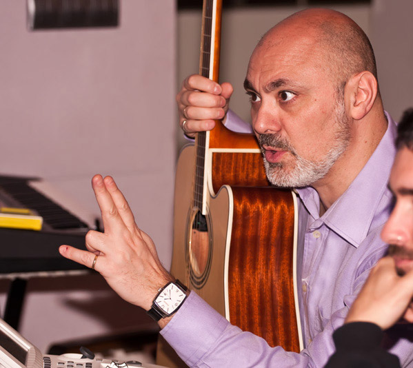 Fotografía de Armando Pardos a Gabriel Sopeña durante una sesión de grabación en Zaragoza el 14 de mayo de 2010